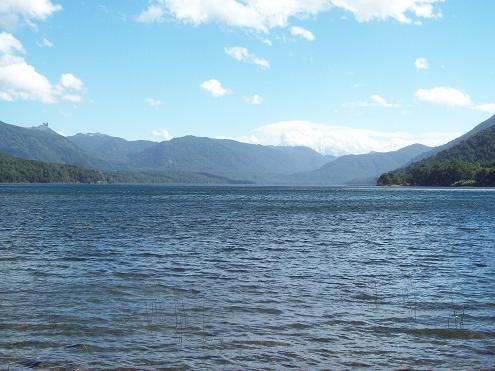 Lago Quillén desde su cabacera; al fondo el volcán Lanín, tapado por nubes.